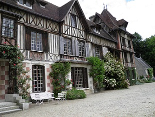 Manoir de Villers à Saint-Pierre-de-Manneville